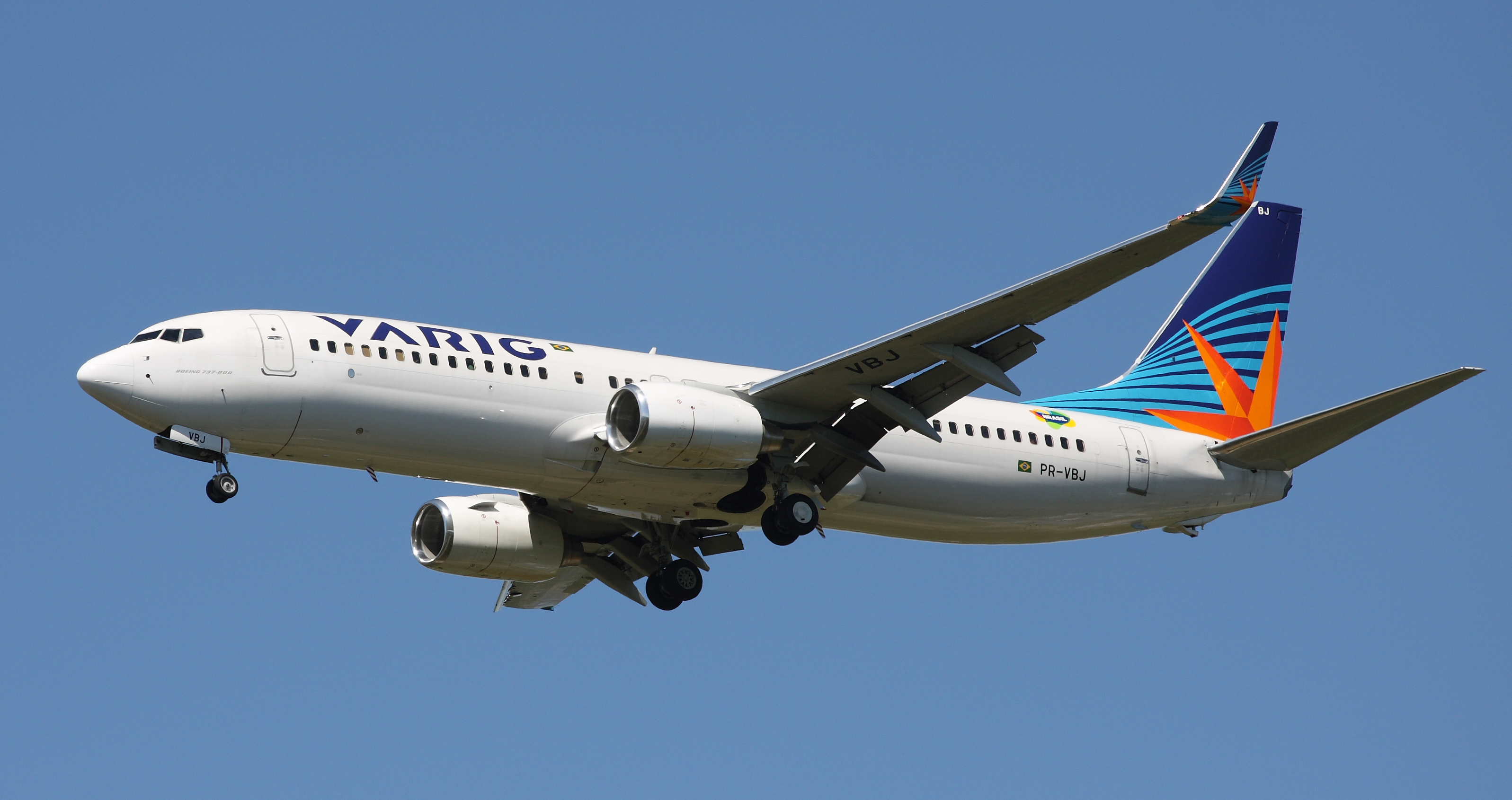 Varig B737-8HX